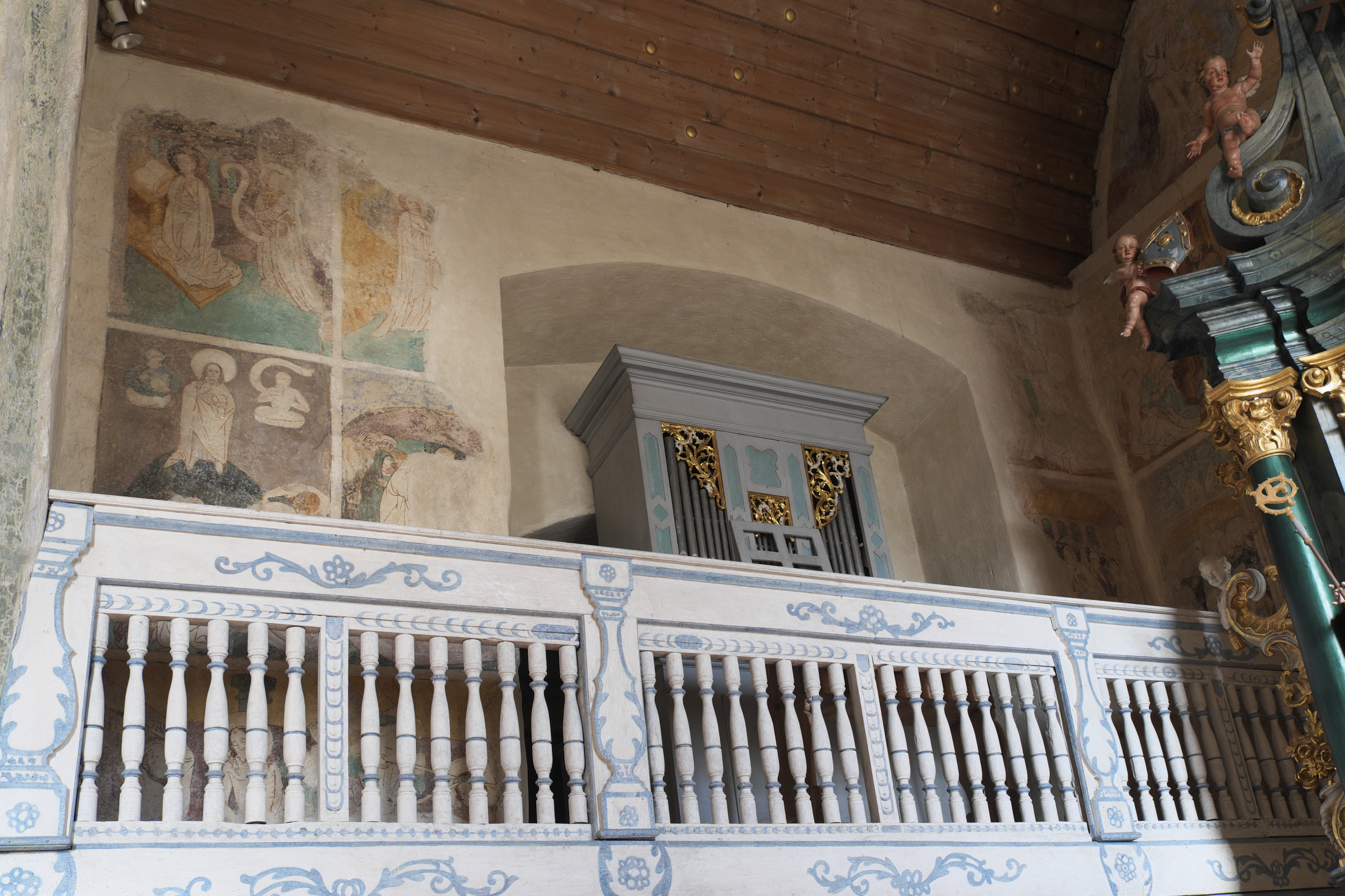 Friedhofskirche, ehemalige Pfarrkirche, St. Gallus in Mühlheim an der Donau im Landkreis Tuttlingen (Baden-Württemberg/Deutschland), Wandmalereien aus der Mitte oder zweiten Hälfte des 15. Jahrhunderts; Darstellung an der Nordwand: Verkündigung (oben), Verklärung Jesu (unten)